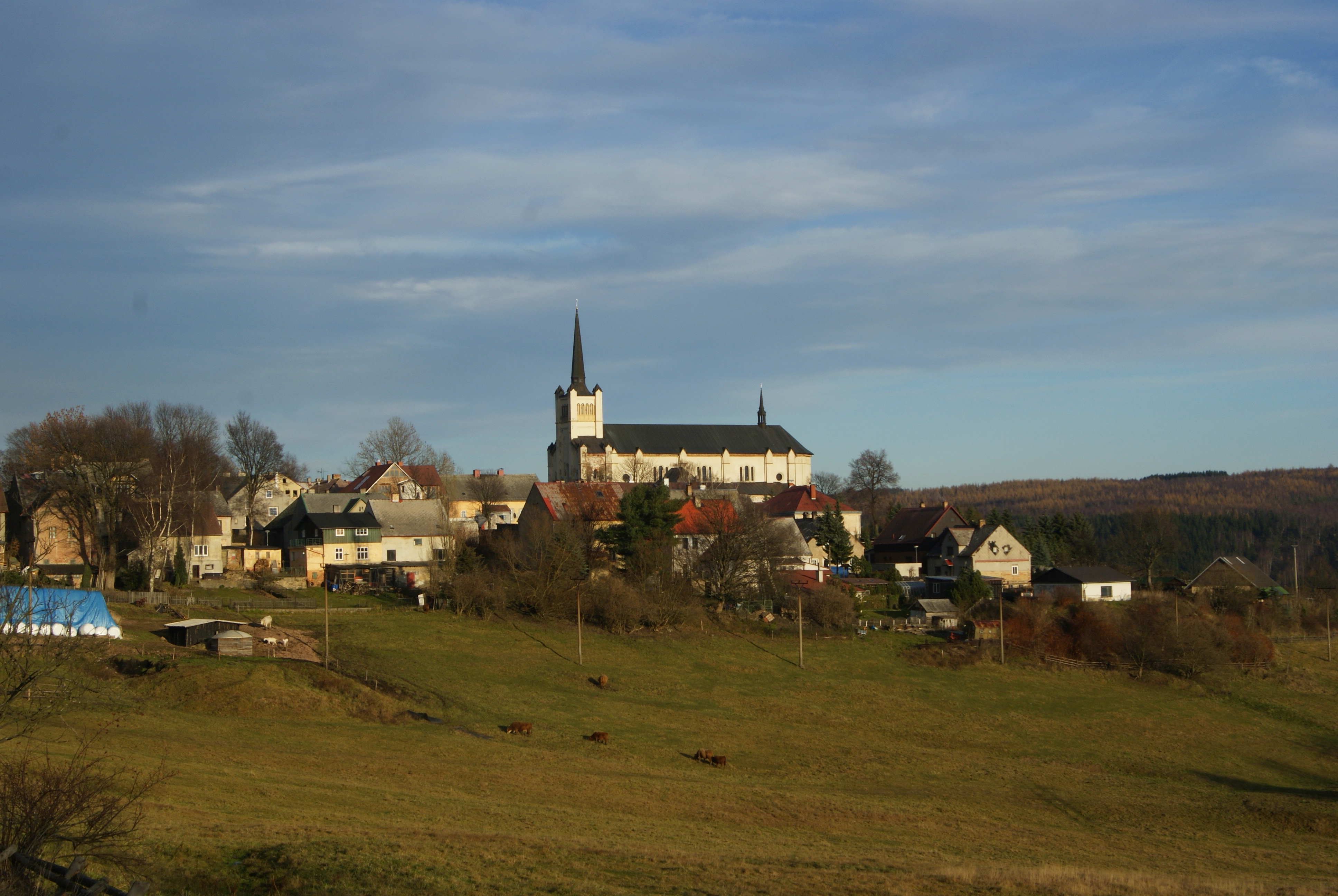 Kirche Vysluni (Dom des Erzgebirges)